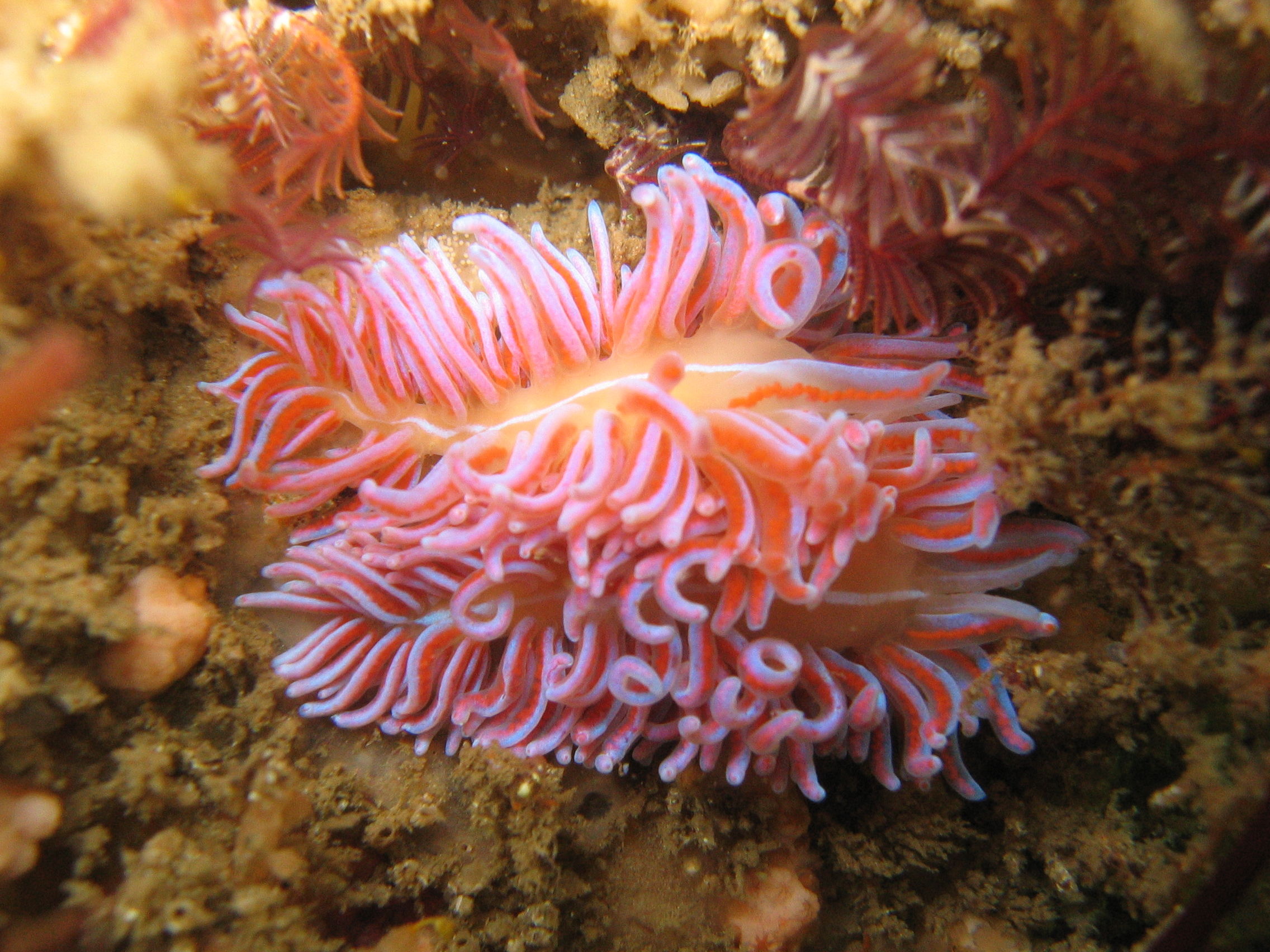 Phyllodesmium horridum en Ciudad del Cabo, Sudáfrica